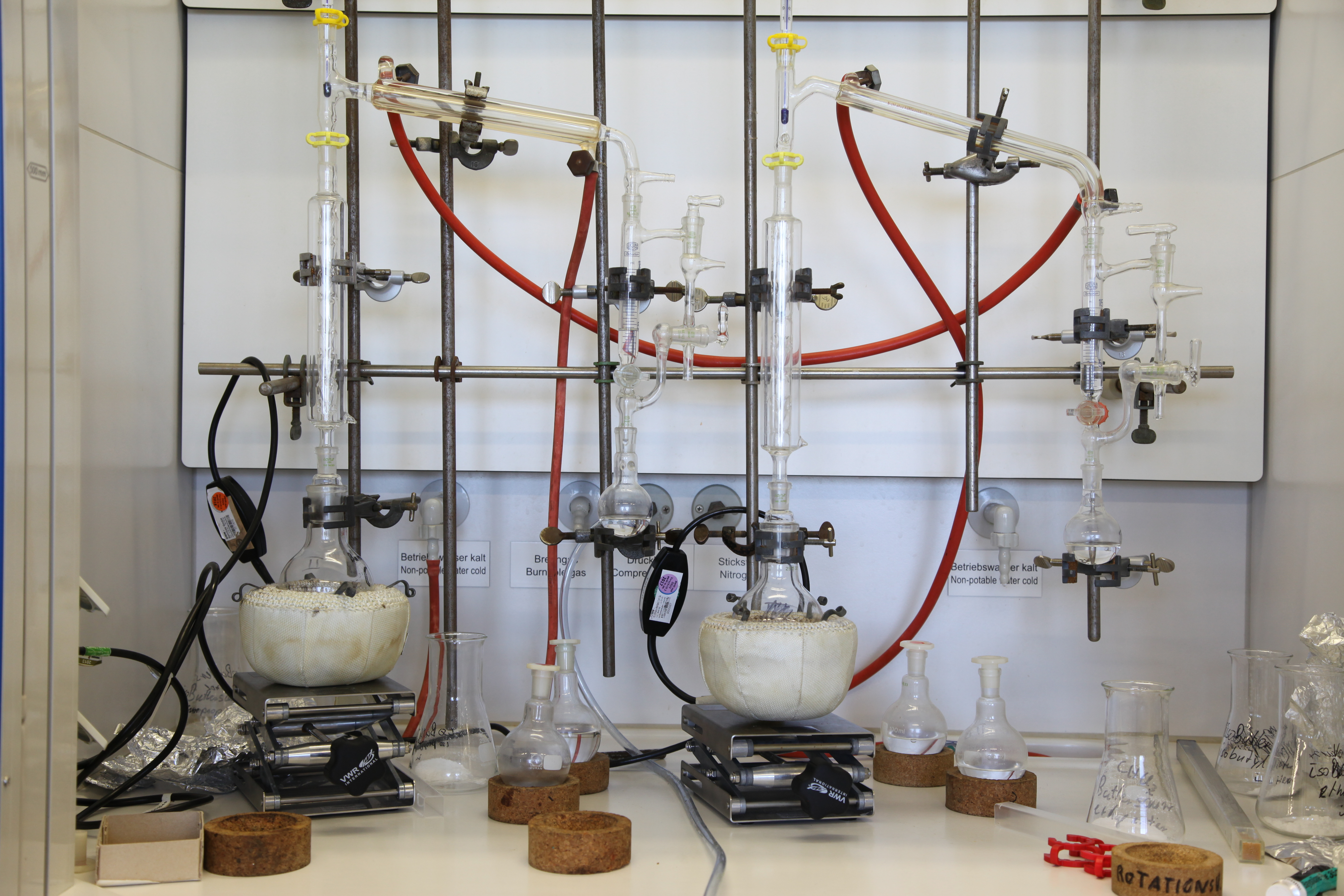 Laborapparatur zur rektifikation von Stoffgemischen